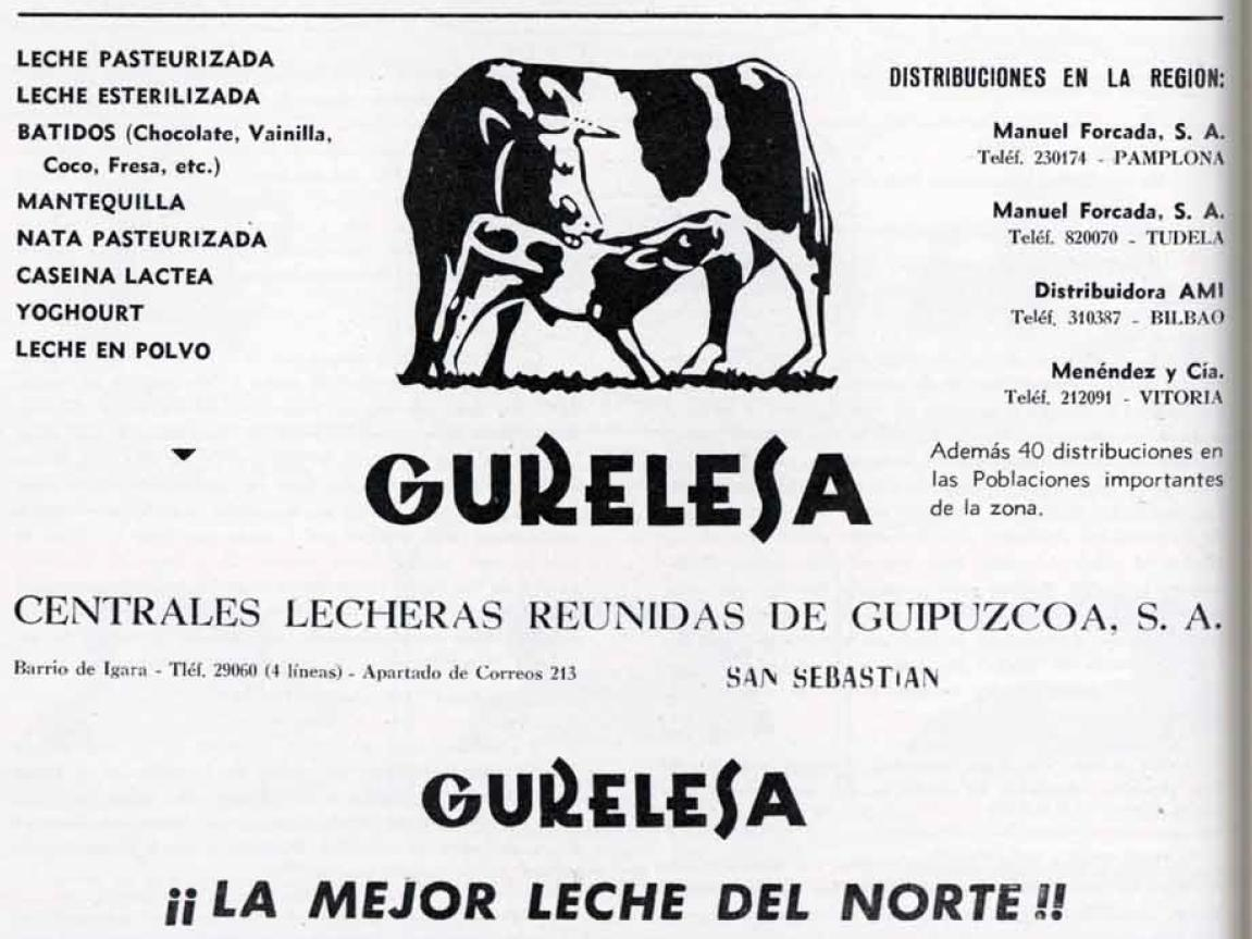 GURELESA LECHE PASTEURIZADA LECHE ESTERILIZADA BATIDOS (Chocolate, Vainilla, Coco, Fresa, etc.) MANTEQUILLA NATA PASTEURIZADA CASEINA LACTEA YOGHOURT LECHE EN POLVO DISTRIBUCIONES EN LA REGION Manuel Forcada, S.A. Teléf. 230174 - PAMPLONA Manuel Forcada, S.A. Teléf. 820070 - TUDELA Distribuidora AMI Teléf. 310387 - BILBAO Menéndez y Cía. Teléf. 212091 - VITORIA Además de 40 distribuciones en las Poblaciones importantes GURELESA CENTRALES LECHERAS REUNIDAS DE GUIPUZCOA, S.A. Barrio de Igara - Tléf. 29060 (4 líneas) - Apartado de Correos 213 SAN SEBASTIAN GURELESA ¡¡LA MEJOR LECHE DEL NORTE!!